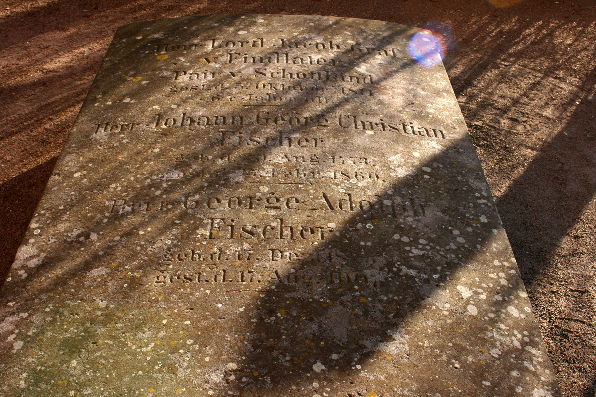 Grave of Findlater & Fischer in Dresden Loschwitz